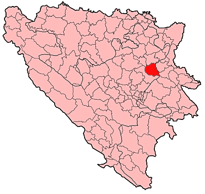 Prikaz općine Kladanj u Bosni i Hercegovini